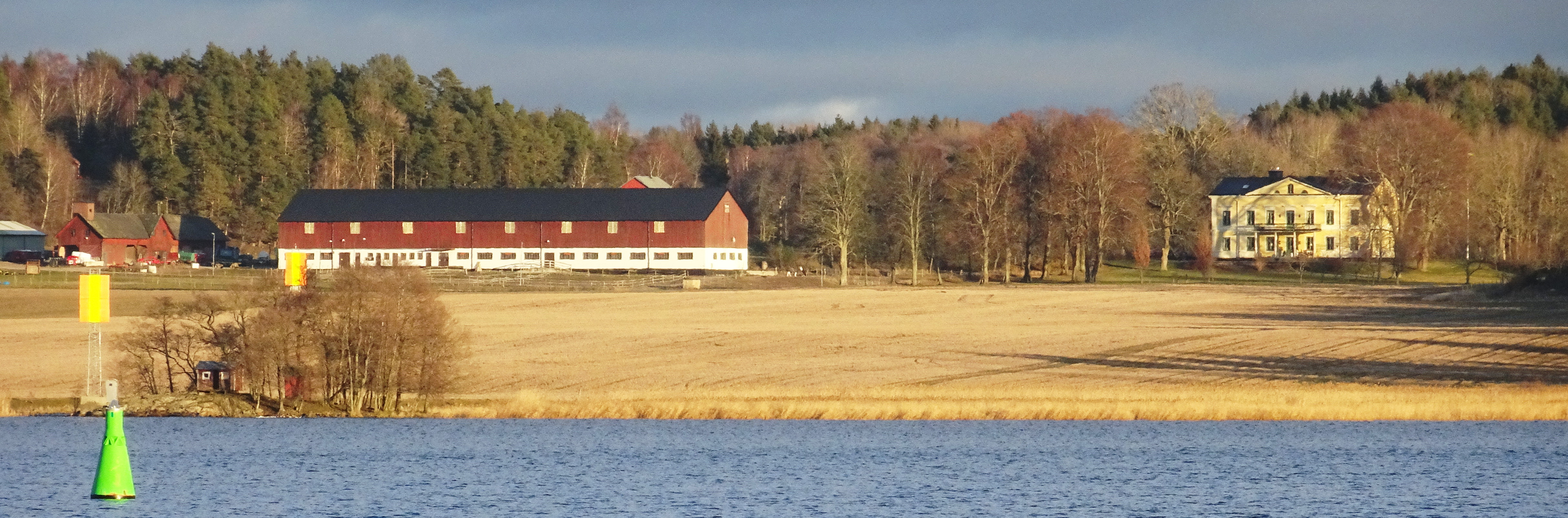 Gården Viad, Botkyrka kommun (panorama från Brandalsund, Hallsfjärden i förgrunden)